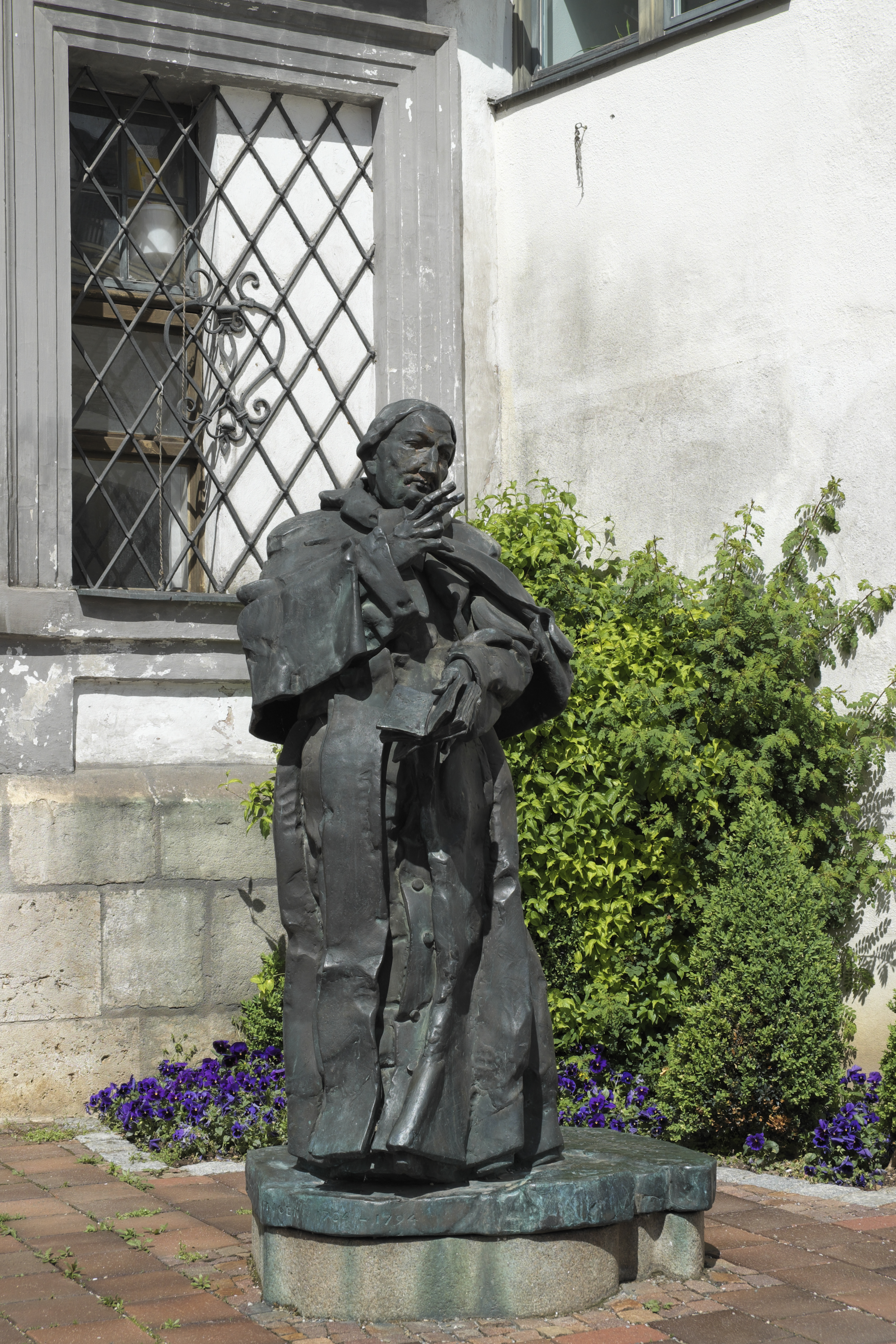 Denkmal für Johann Michael Sailer vor der ehemaligen Universität (heute Akademie für Lehrerfortbildung und Personalführung) in der Kardinal-von-Walburg-Straße 7 in Dillingen an der Donau (Bayern)